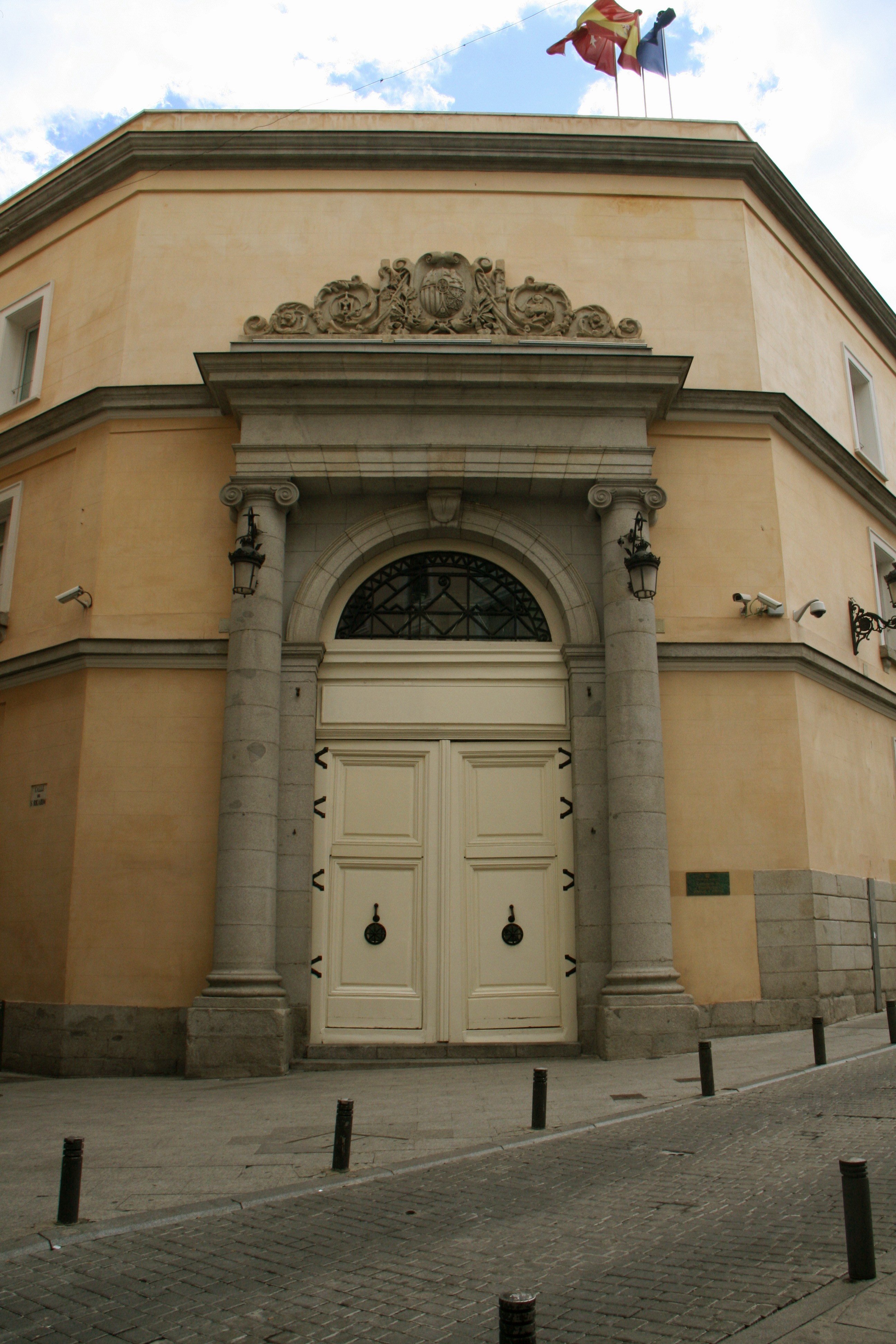 Real Casa Postas - Portón